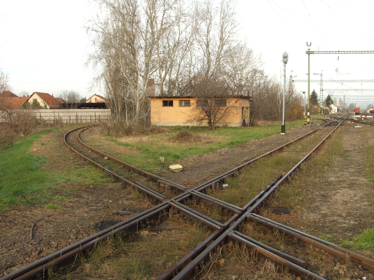 Megszakítás nélküli vágányátszelés Kiskőrös állomáson: a keskeny nyomközű keresztezi át a Kiskőrös–Kalocsa-vasútvonalat.